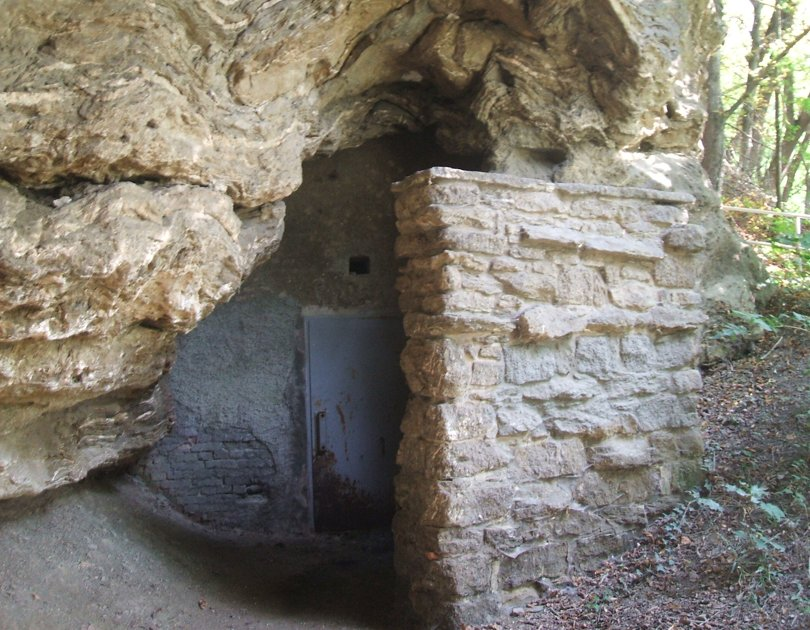 Teufelsloecher in Jena, Germany